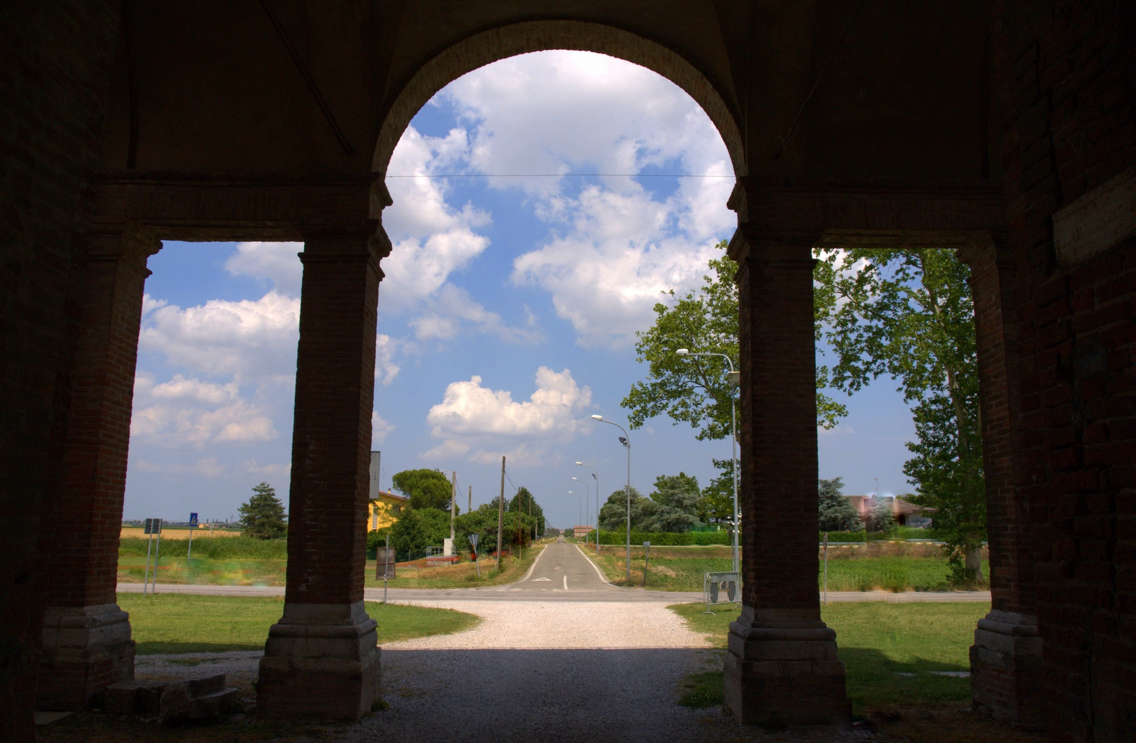 Castello Estense di Belriguardo - MiBAC This is a photo of a monument which is part of cultural heritage of Italy.